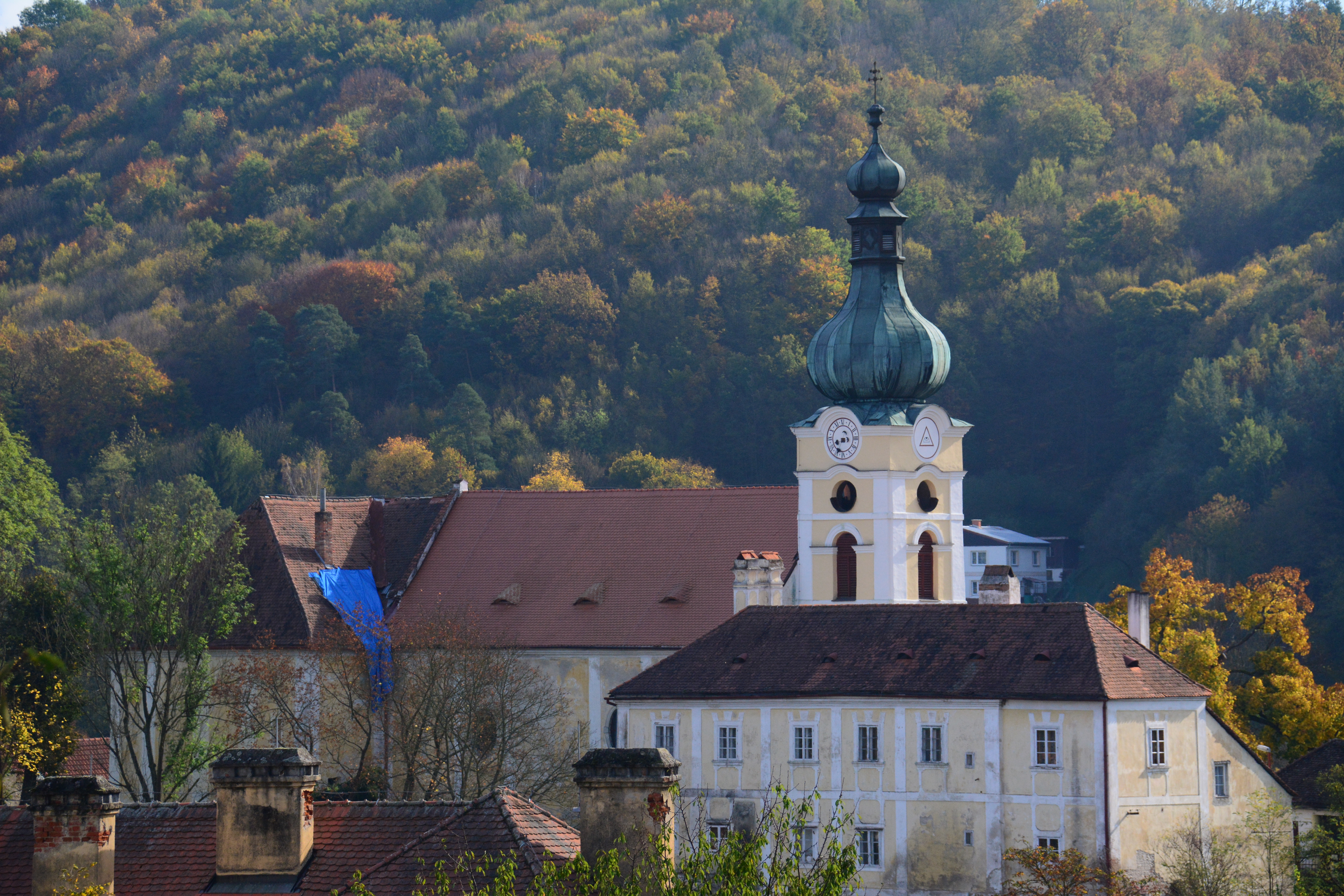 Kirche und Pfarrhof von Vranov nad Dyjí / Frain an der Thaya